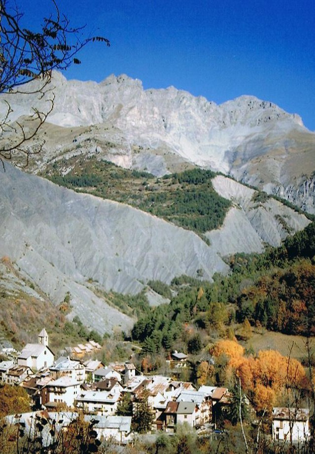 A 1 250 m d'altitude et vu du sud ouest, le village d'Entraunes enchassé dans les schistes noirs (J 3-5) du Jurassique entaillés là par le torrent de Bourdoux et dominé par la ligne de crête sud du synclinal perché de Roche Grande (2 753 m)